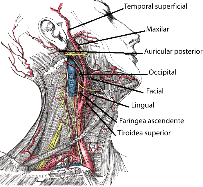 Traducción de la imagen